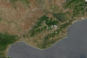 Планините Кушница и Чиста гора между Кавалския залив на изток, Драмското поле на север, Серското поле на северозапад, Богданската планина на запад и залива Орфано на югозапад.